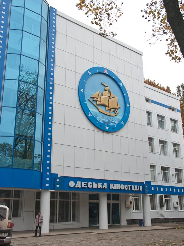 Украина (Україна): обл.Одесская (обл.Одеська): Одесса (Одеса): р-н Приморский: бул.Французский,33: Одесская киностудия; 11:05 04.11.2008